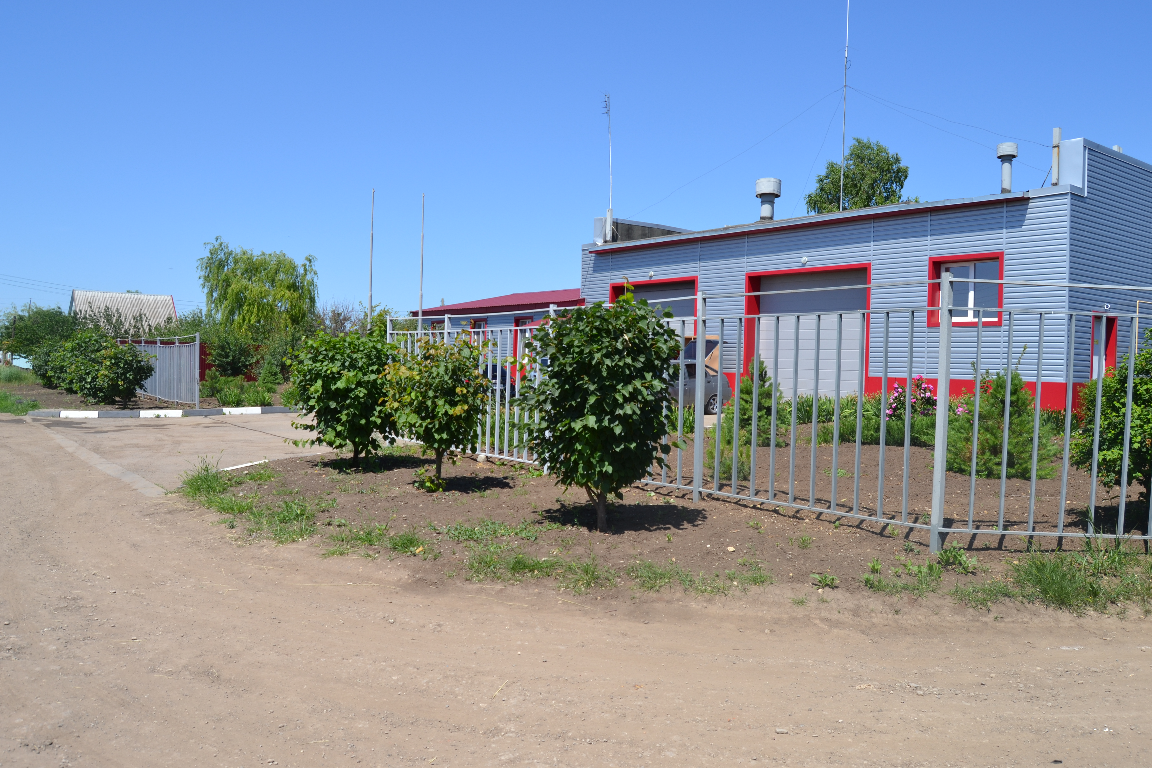 Изображение села. Пожарный пост (Сабуровка, Саратовский район)